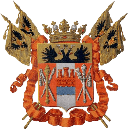 Official Russian Empire coat of arms Don Oblast. Герб Российской Империи Области Войска Донского в Гербовнике Бенке. Утверждён Императором Всероссийским Александром Вторым в 1878 году.